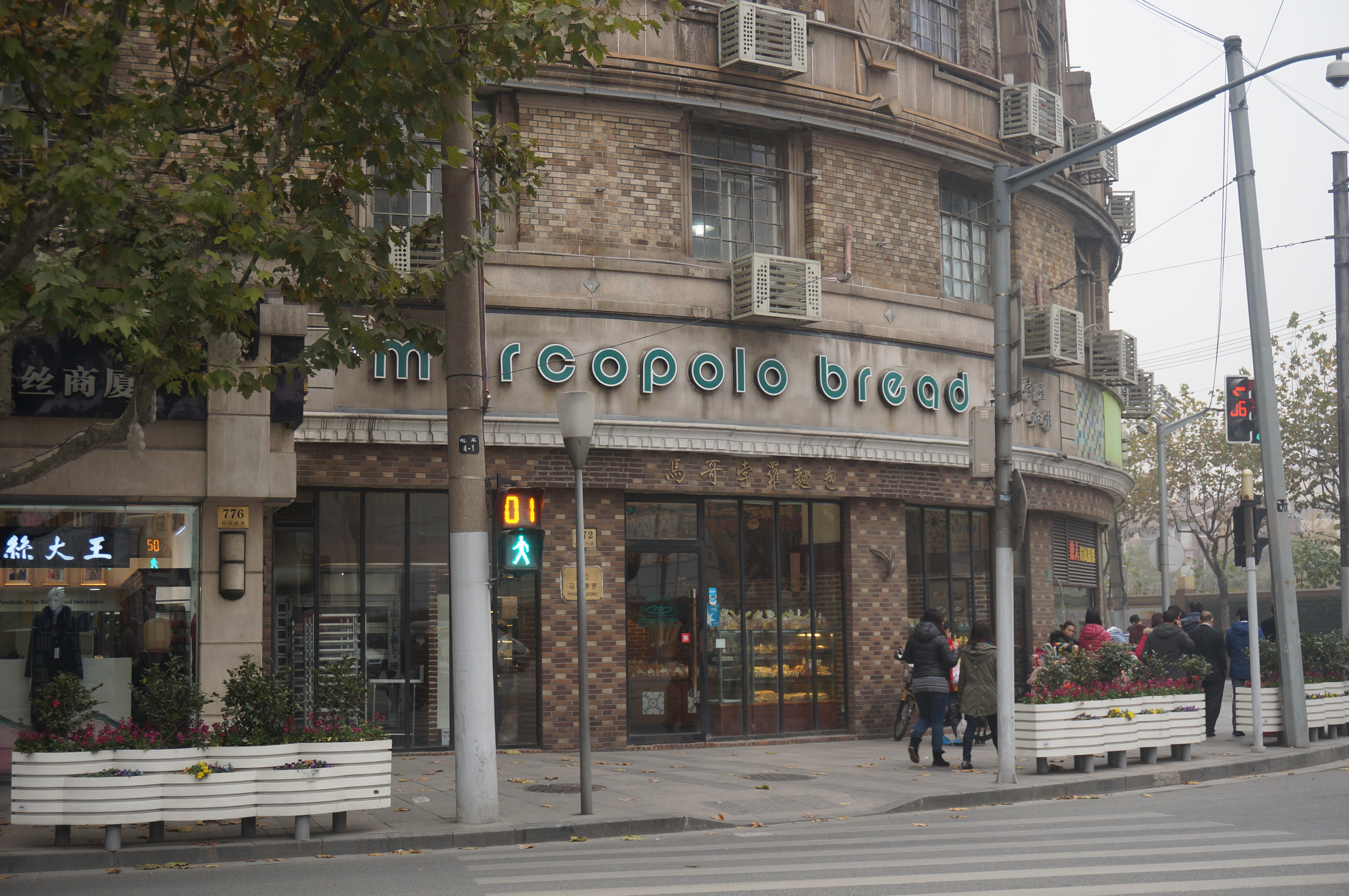 中文（中国大陆）: 位于南京西路上的马可孛罗面包店